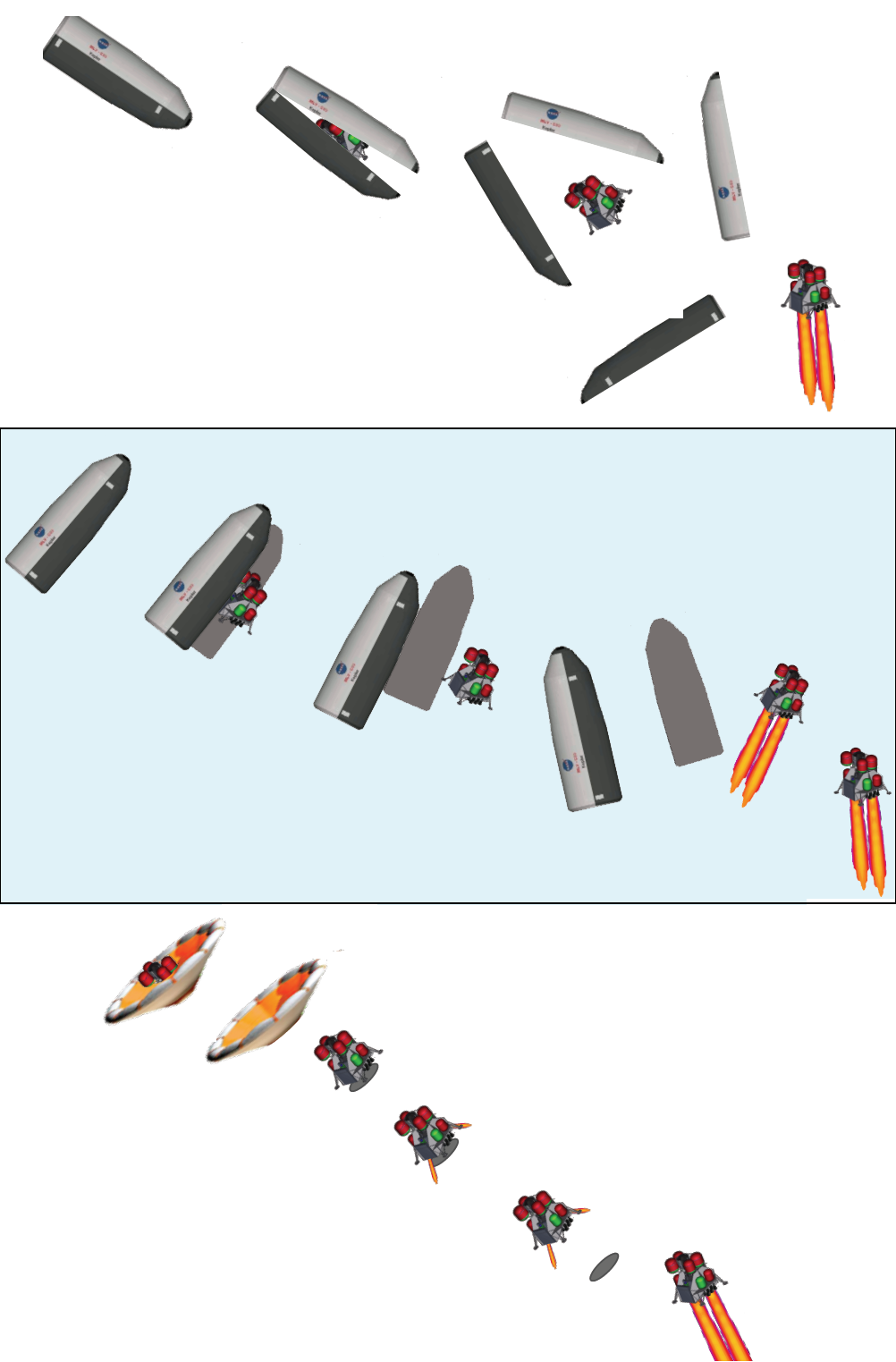 Human Exploration of Mars Architecture-EDL source : NASA Design Reference Architecture 5.0 Annexe 2 (2014)